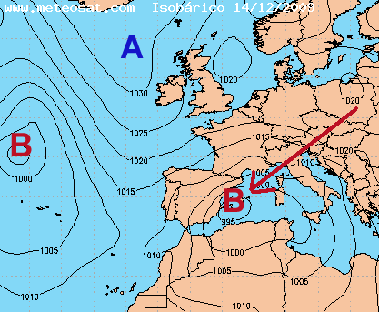 isobaras